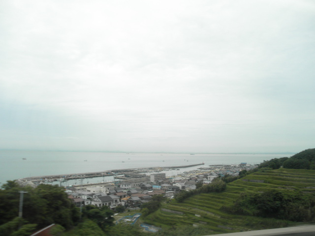 兵庫県淡路市室津地区 遠景